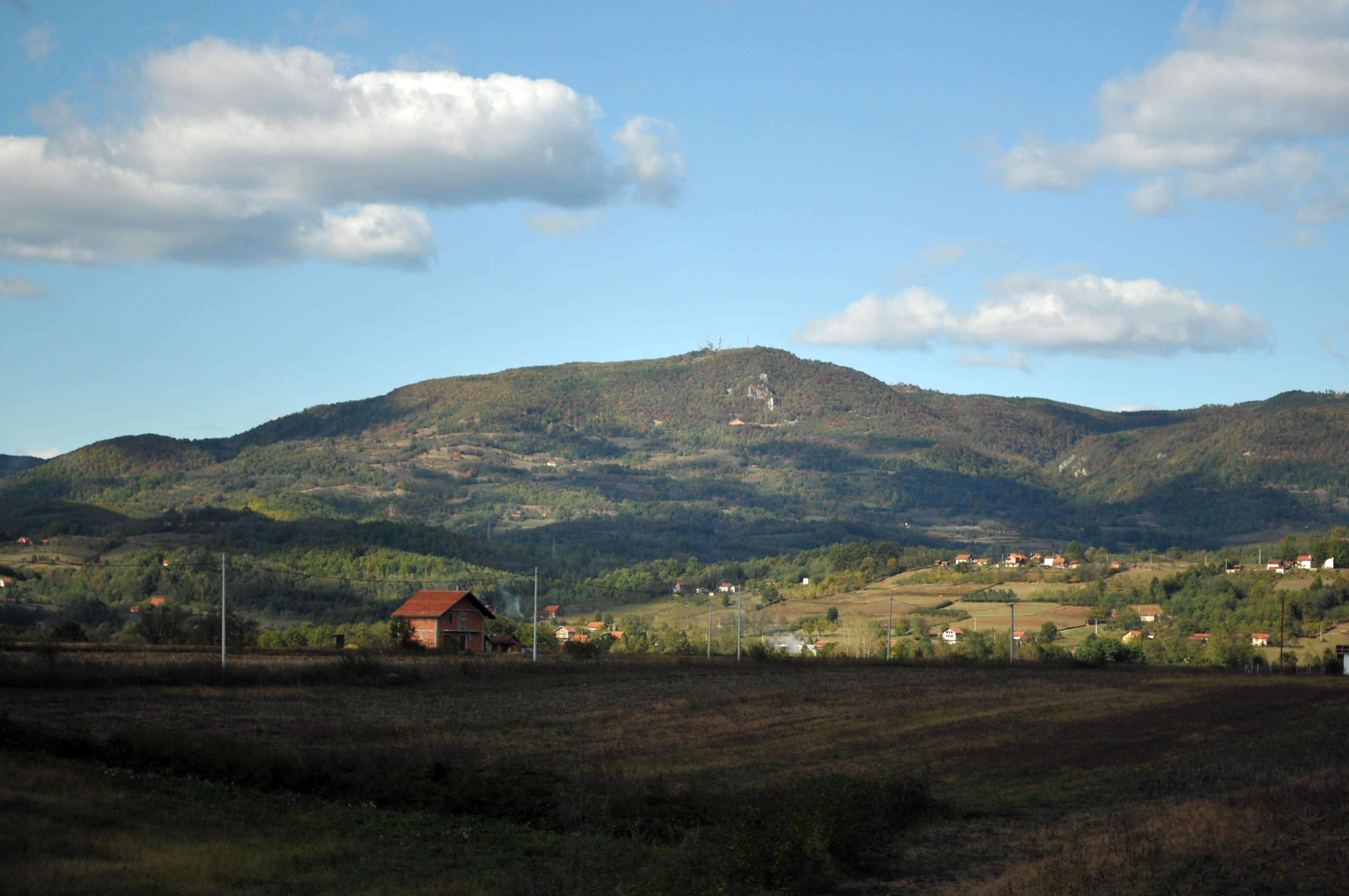 nacionalni park kozara,planina kozara Сликава е подигната во рамките на проектот „По трагата на душата 2015“.